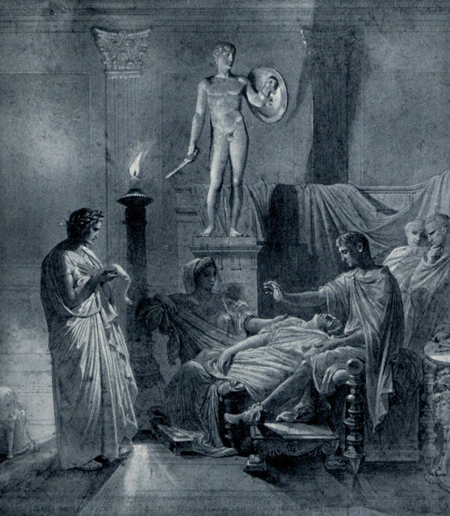 Tu Marcellus eris, de Jean-Auguste-Dominique Ingres (1832), Louvre, París.